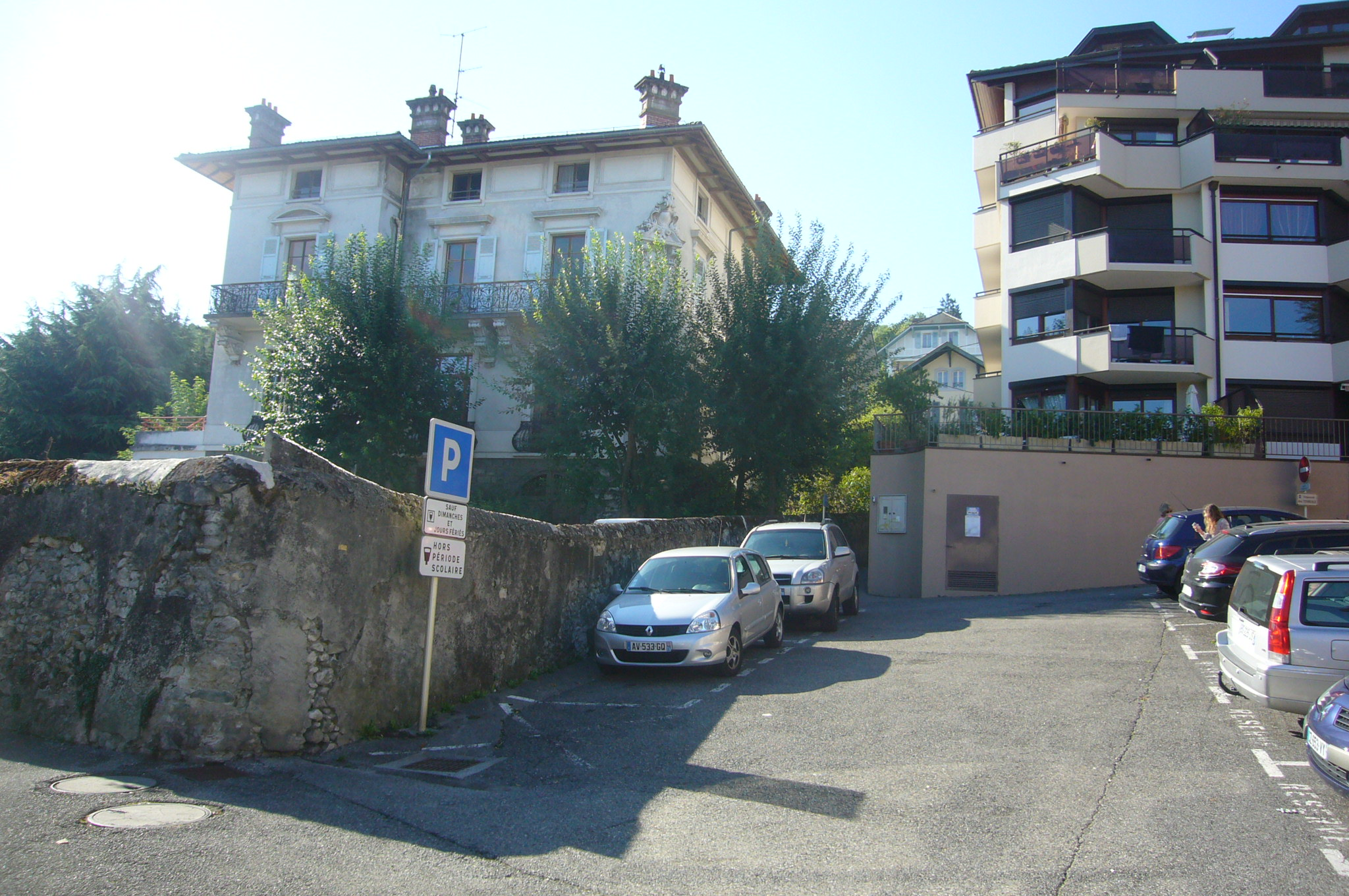 La Villa « La Belle Epoque » (ex-villa Gabrielle), 26 av. des Sources à Evian en 2015